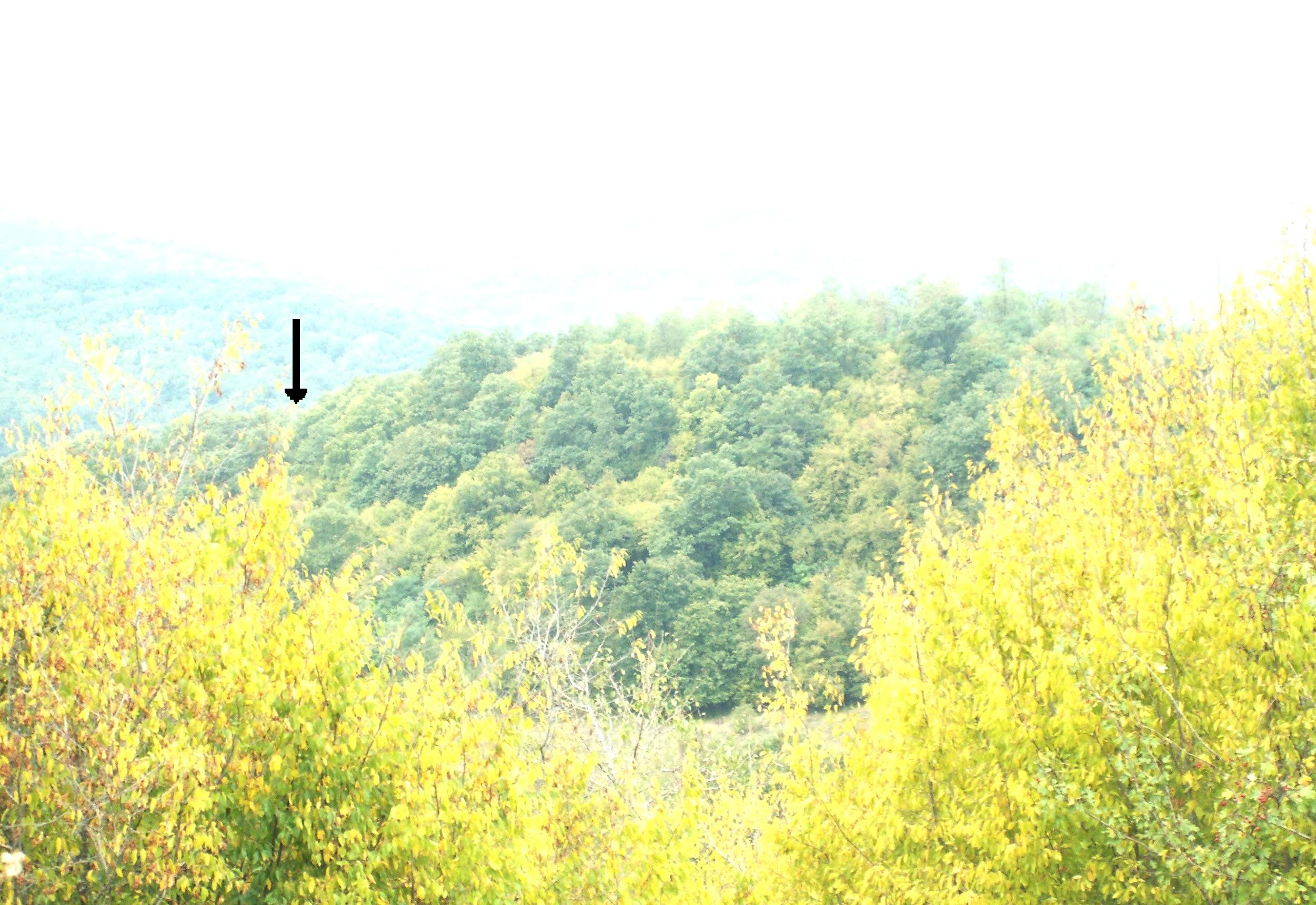 Хълмът Тепето, който крие руините на римската крепост. Фото: Вл. Стойков.